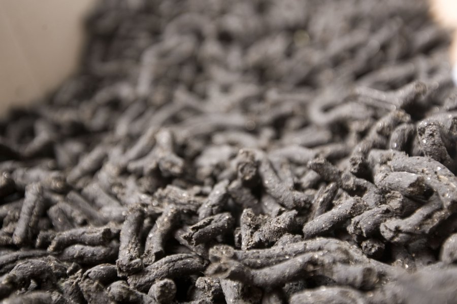 Nuotekų dumblas